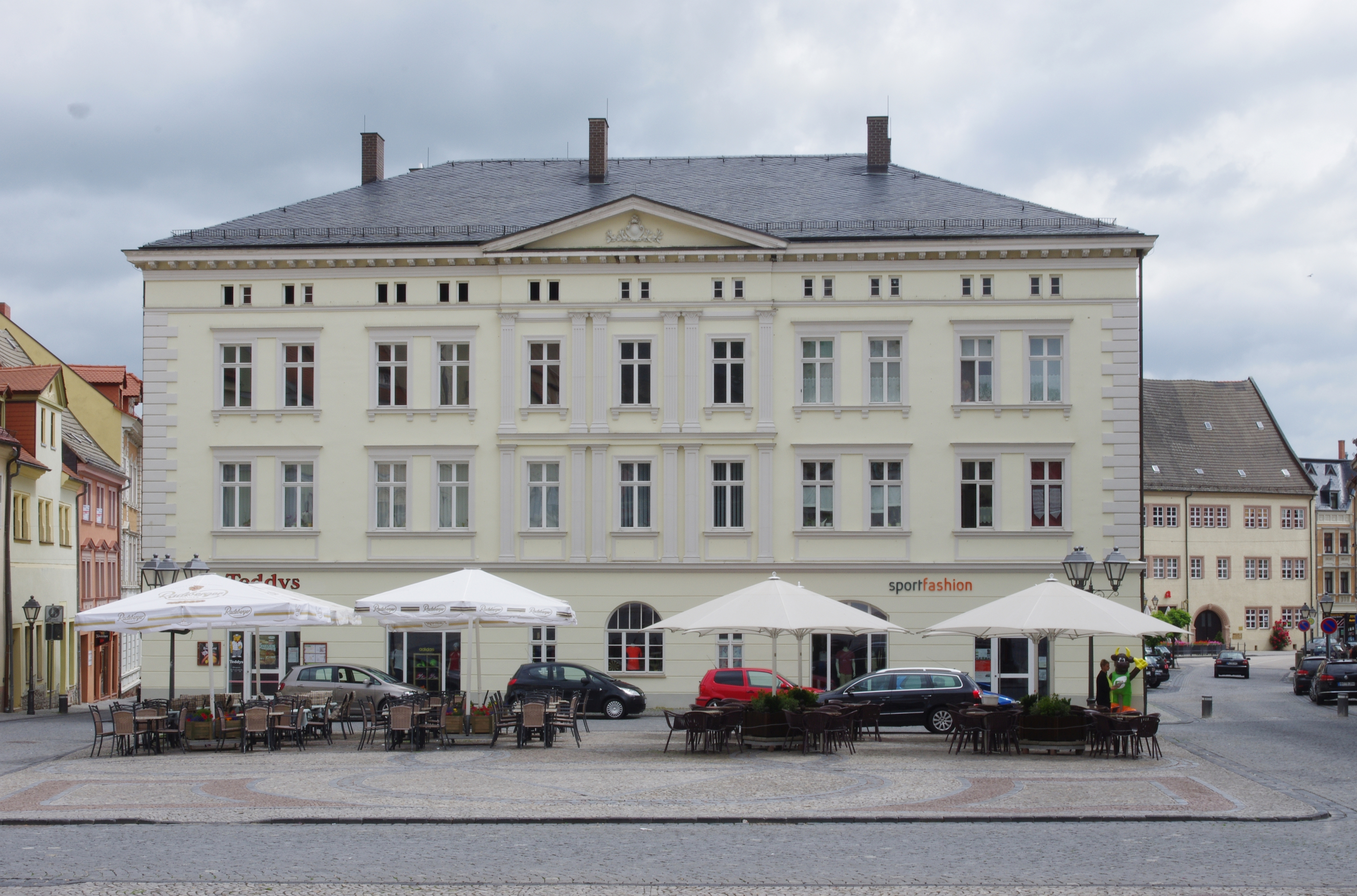 Lutherstadt Eisleben in Sachsen-Anhalt. Das Haus (Adresse im Namen der Datei) steht unter Denkmalschutz.